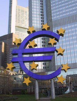 La sede della Banca Centrale Europea, a Francoforte